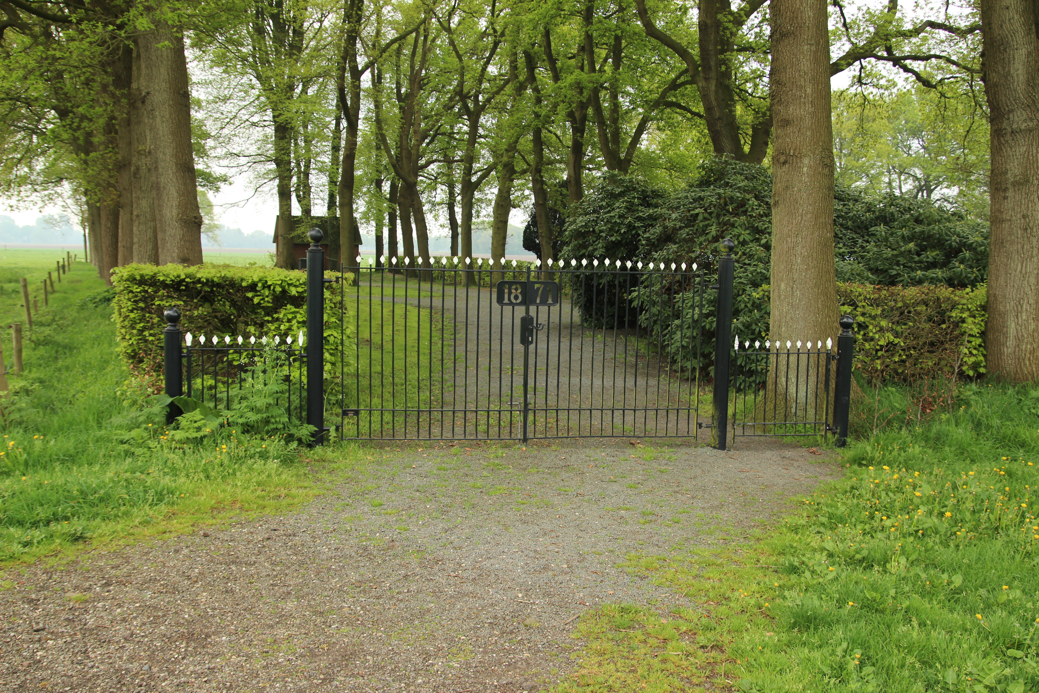 Toegangshek van de Hervormde begraafplaats in Noordlaren, gefotografeerd in 2014